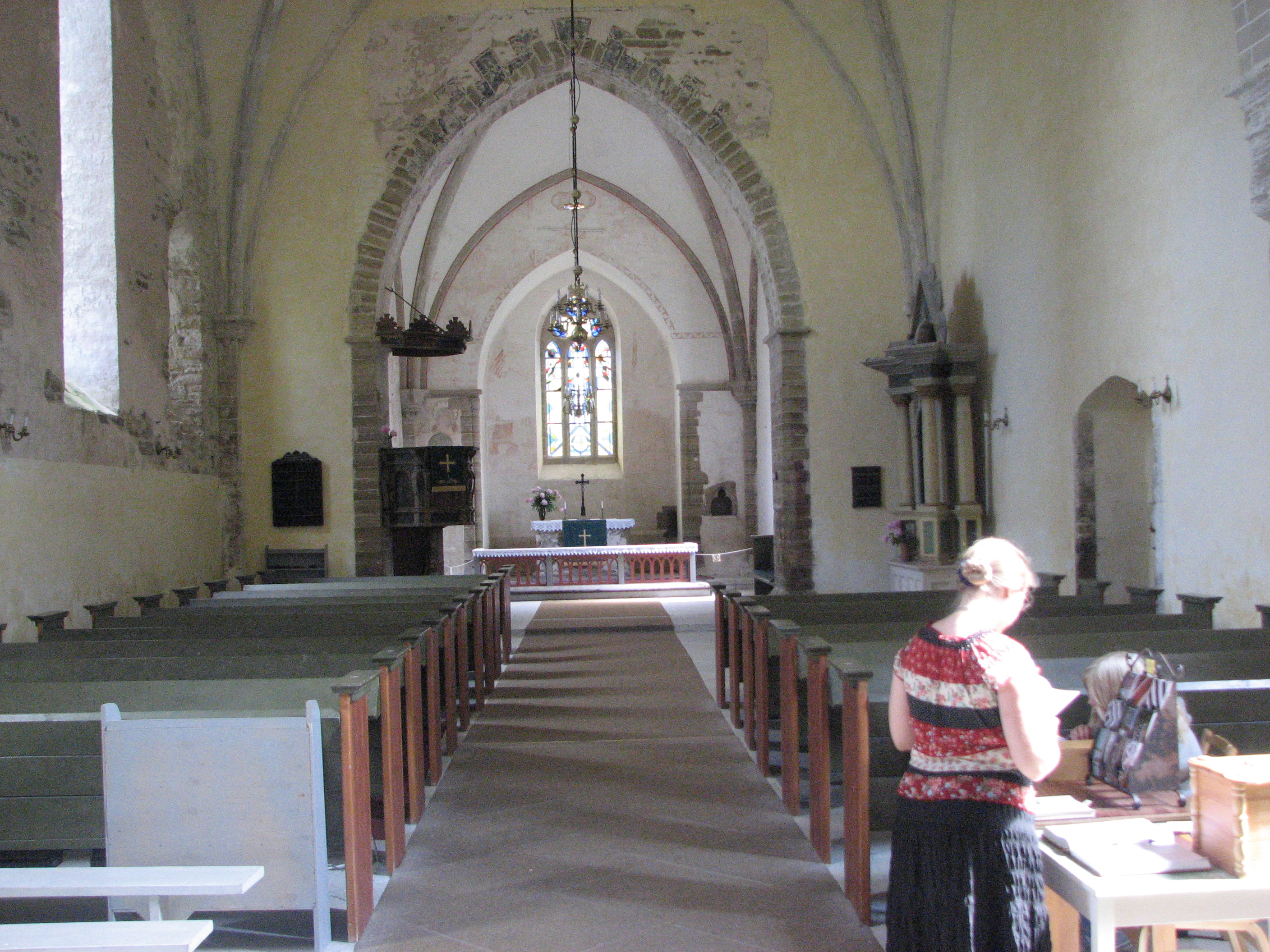 Muhu kiriku sisevaade altari poole